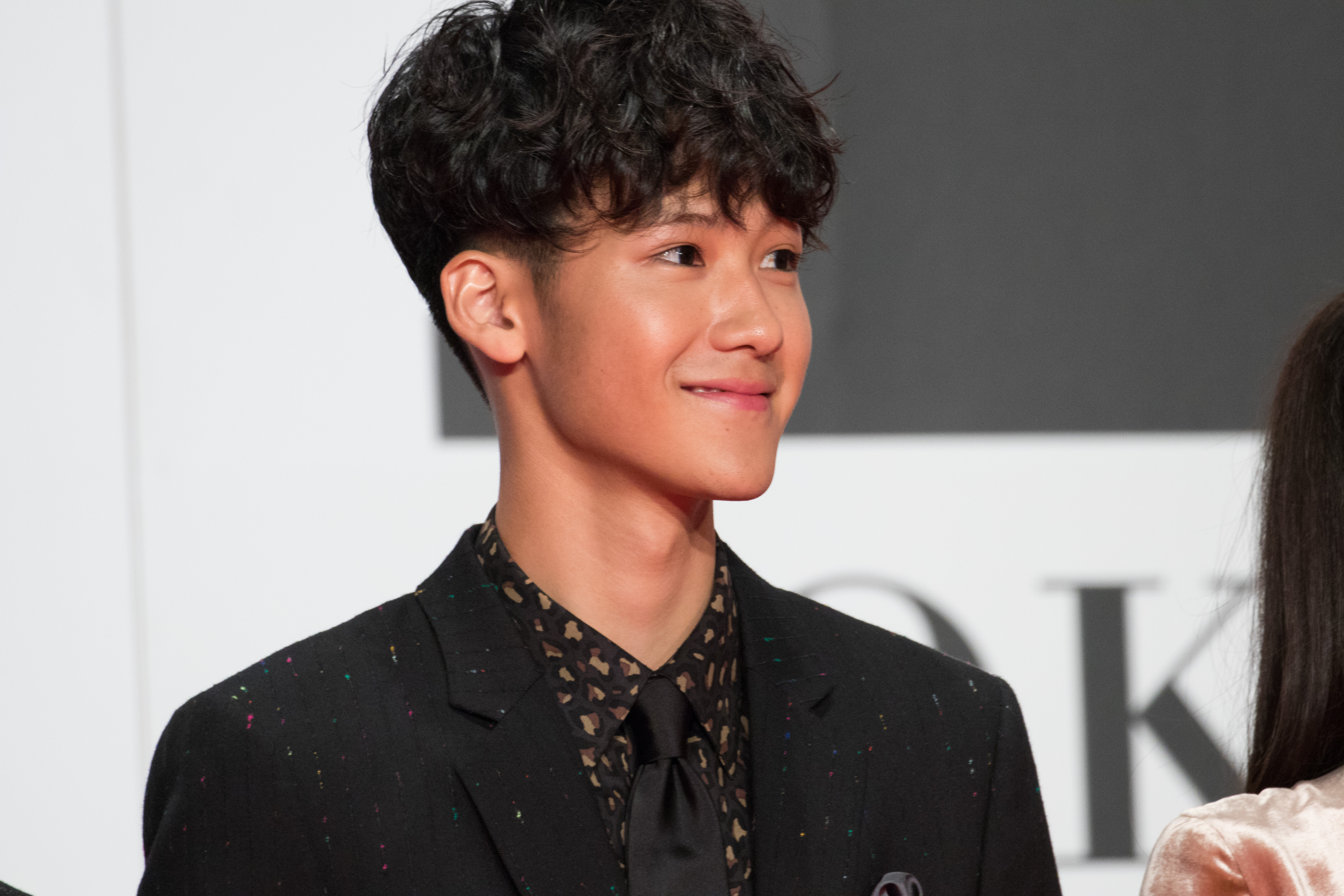 第29回 東京国際映画祭 オープニングセレモニー 葉山奨之 (アズミ・ハルコは行方不明)